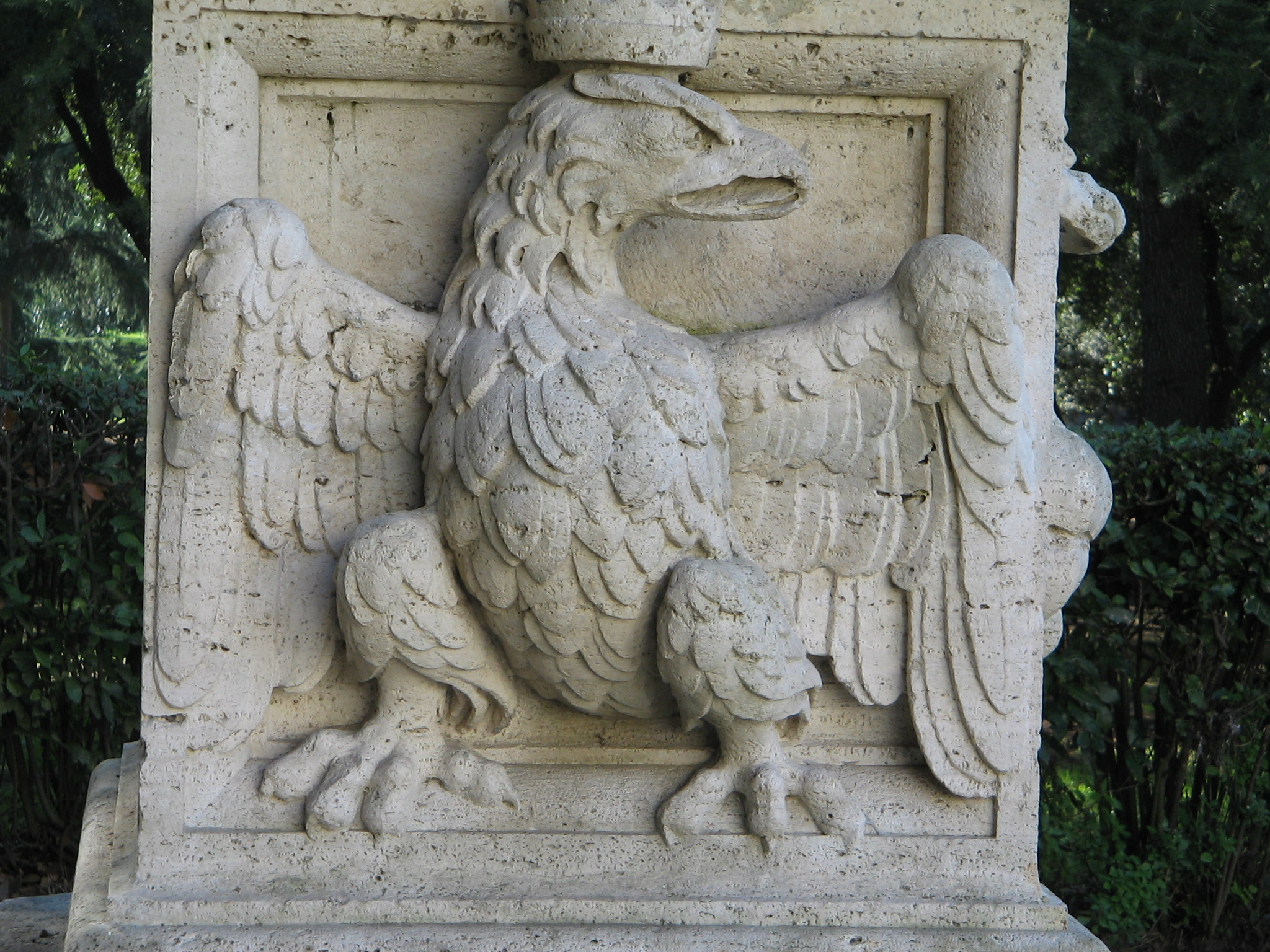 Museo e Galleria Borghese Roma: stemma della famiglia Borghese